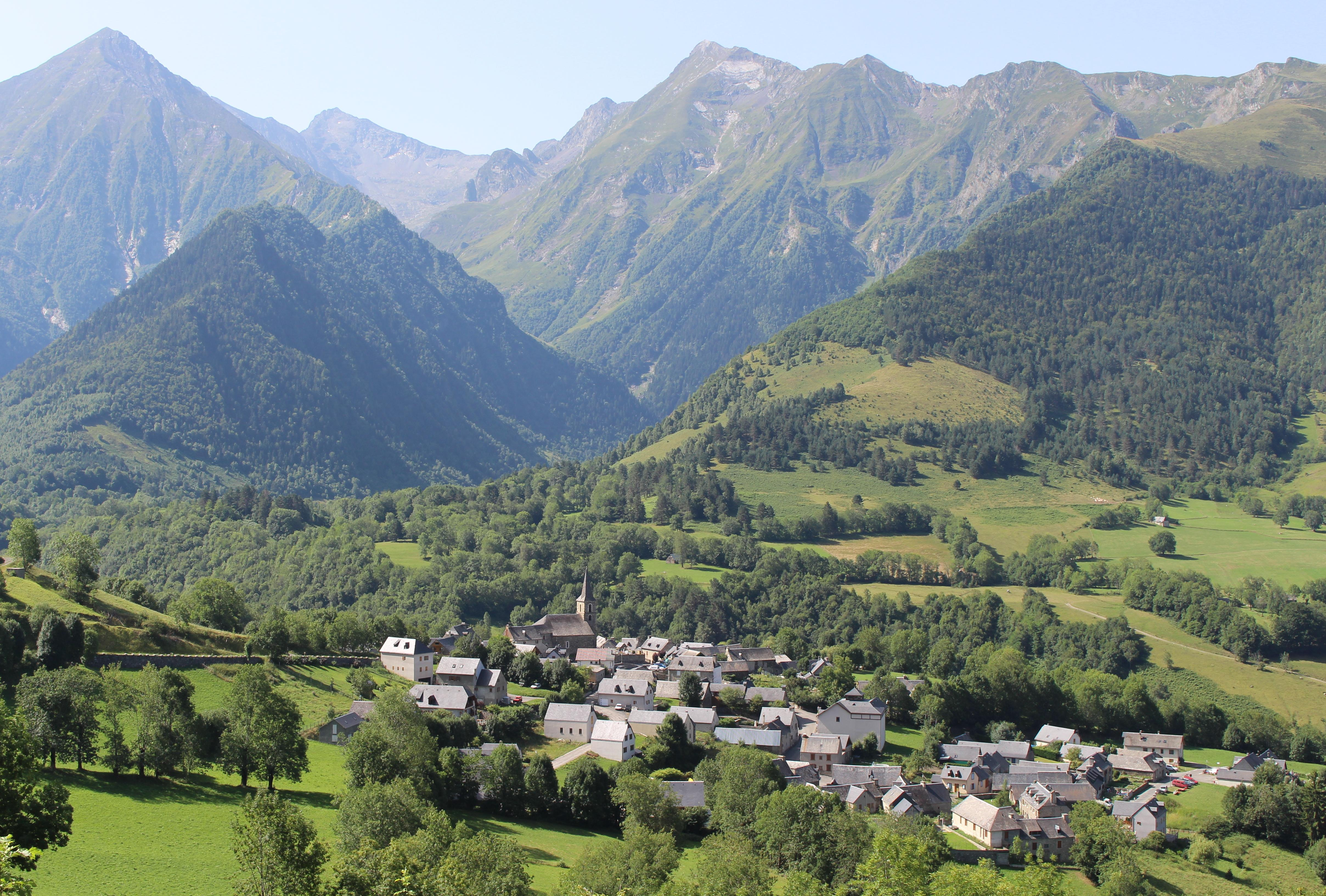 Azet (Hautes-Pyrénées)